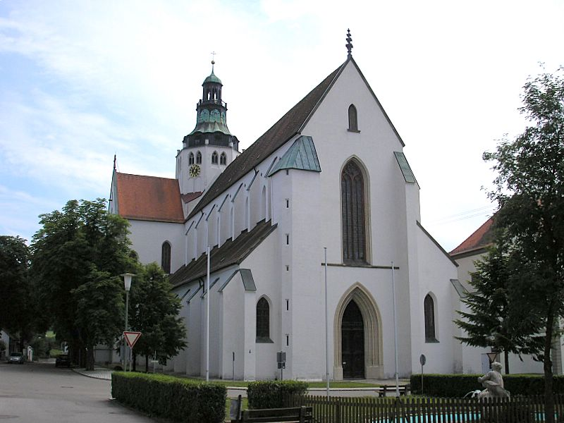 Klosterkirche Kaisheim (Landkreis Donau-Ries, Bayern). Ansicht von Westen. Eigene Aufnahme, Juli 2006 / Abbey church Kaisheim near Donauwoerth, Bavaria, Germany. View from the west. Own photo, July 2006